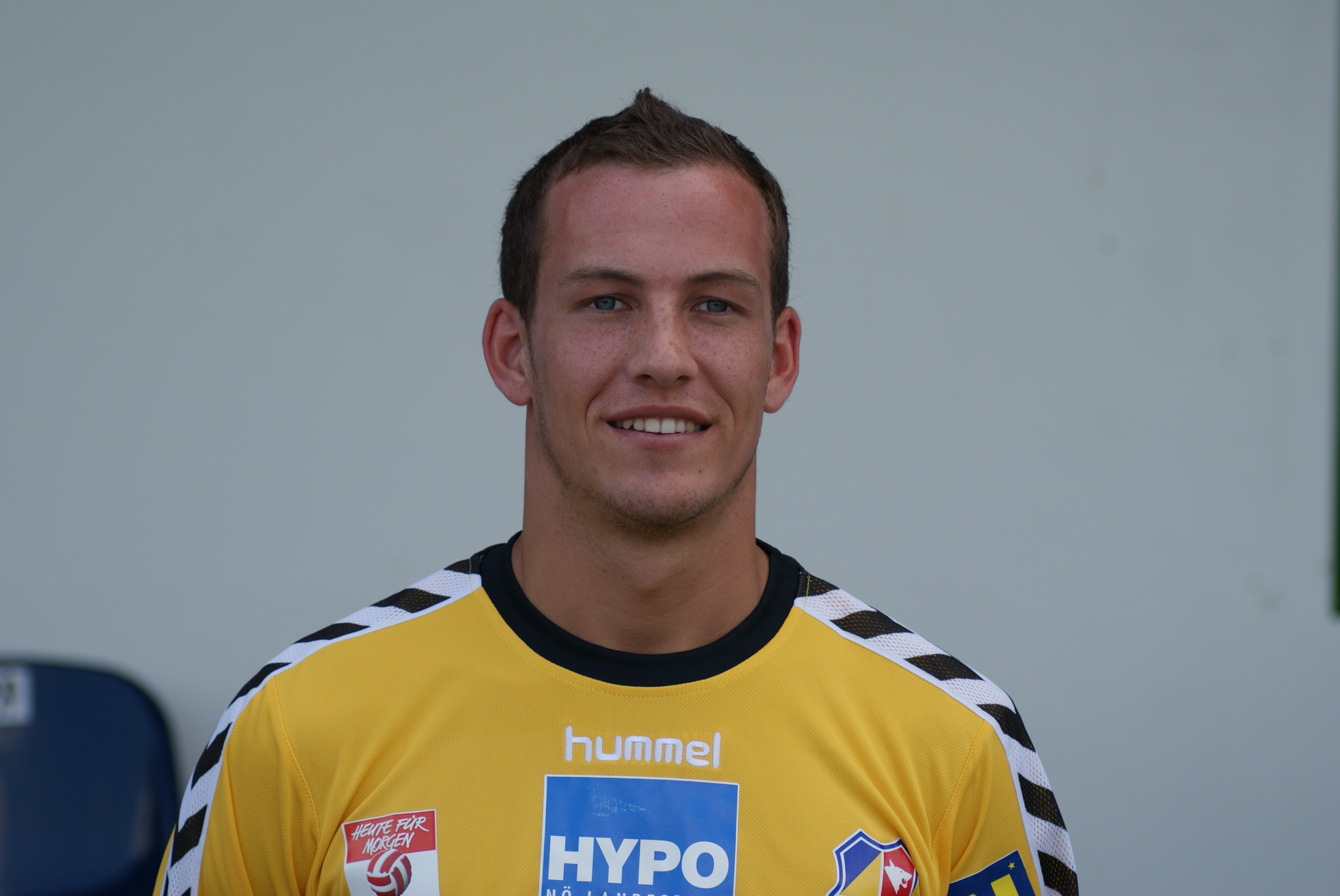 Bernhard Kotinsky, SKNV St. Pölten.